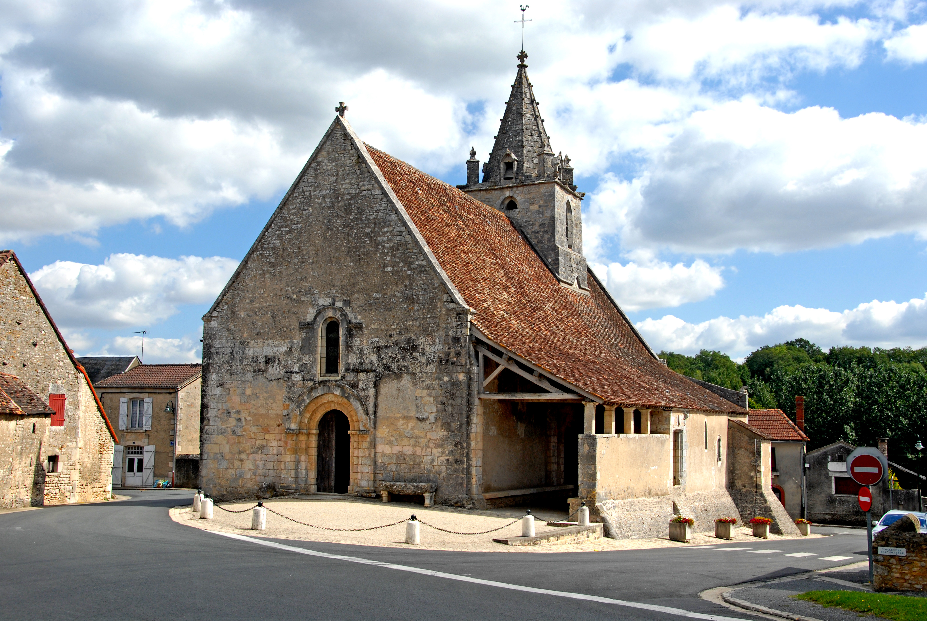 Angigny, Notre-Dame, von SW